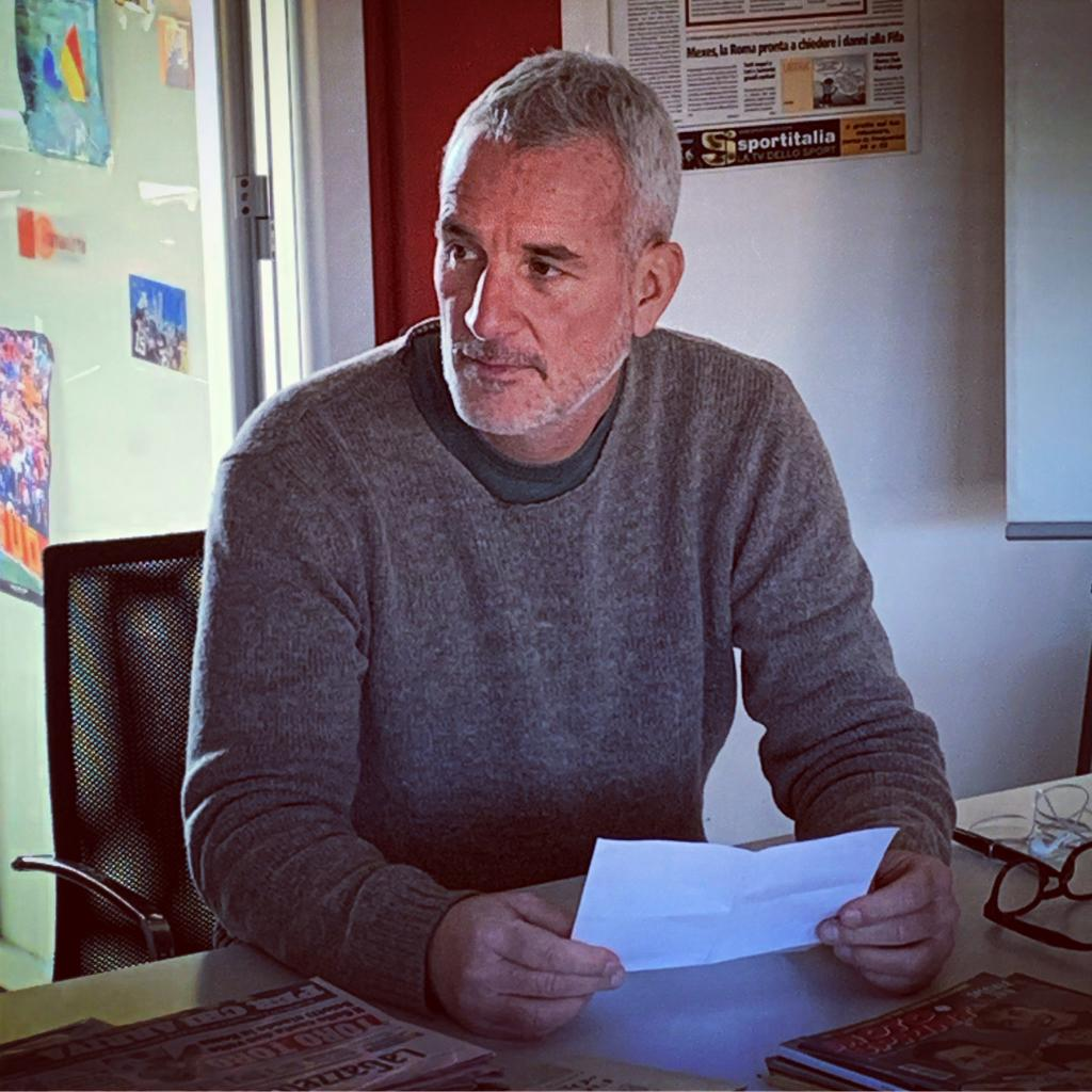 Daniele Lo Monaco giornalista italiano